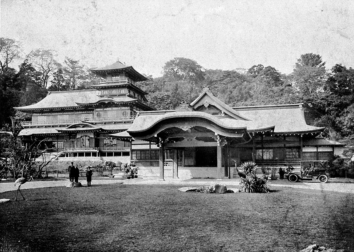 浅野総一郎自邸「紫雲閣」（1909年） 東京三田。設計・伊東忠太。内部には当代一流の画家たちによる豪華絢爛名装飾が施され、海外からの賓客の迎賓館として使われた。戦災で焼失。